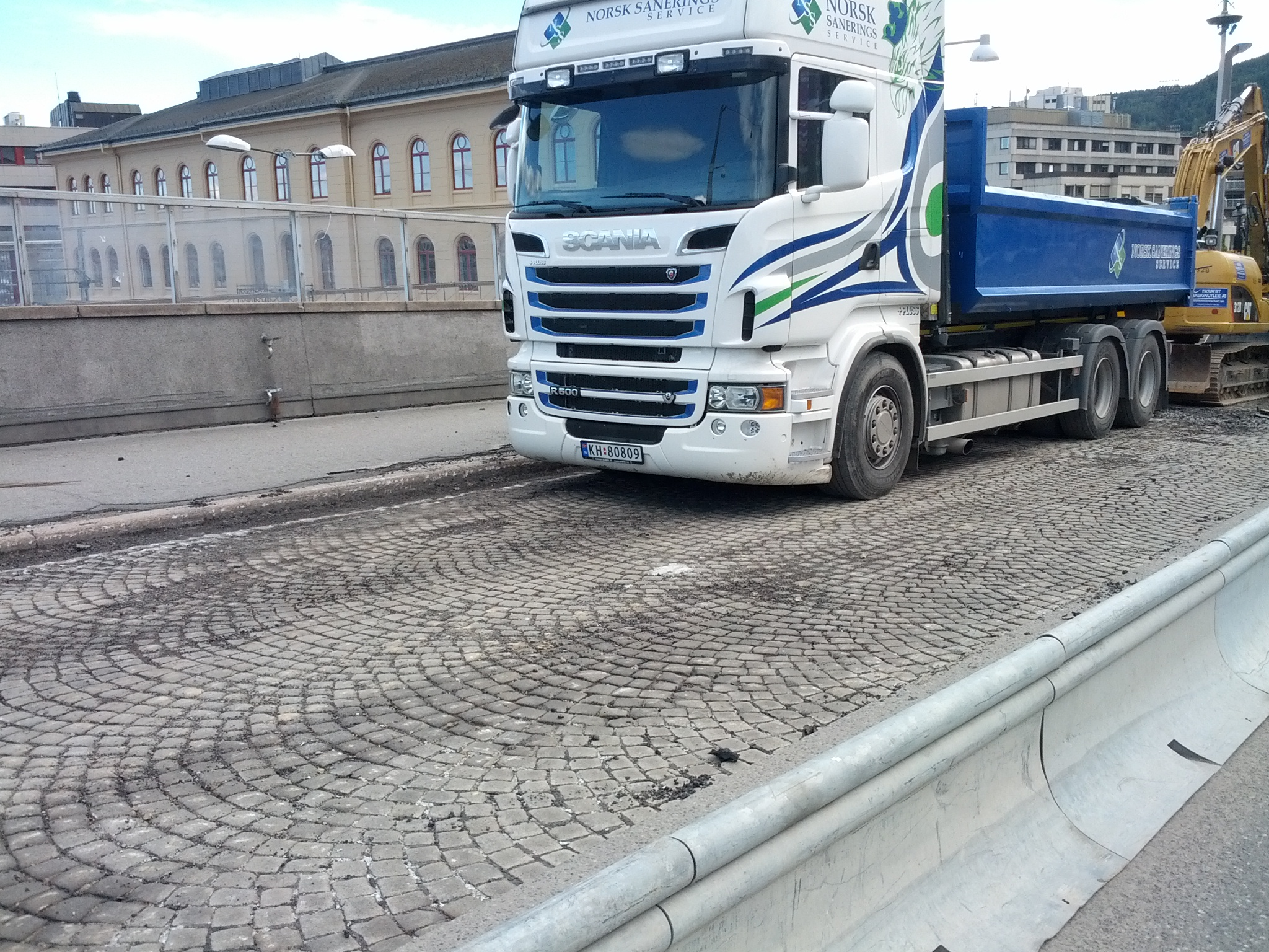 Dette bildet viser brosteinen som har ligget under asfalten. Brosteinen ble lagt i 1936.